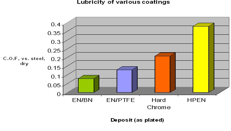 schéma electroless nickel